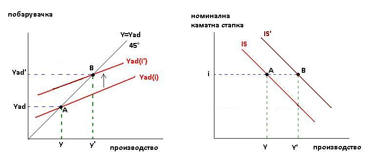 При непроменета каматна стапка i, зголемувањето на која било егзогена компонента на побарувачката е претставено на левата страна, преку нагорно поместување на кривата на агрегатна побарувачка. Рамнотежата настанува во точката B, а новиот рамнотежен аутпут Y (ниво на производство) е повисок од почетното ниво Y. Графиконот на десната страна покажува дека IS кривата се поместува надесно за дадена каматна стапка.